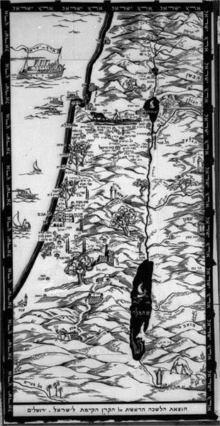 מפת א"י שהותקנה בשביל הבולים לבתיה"ס.